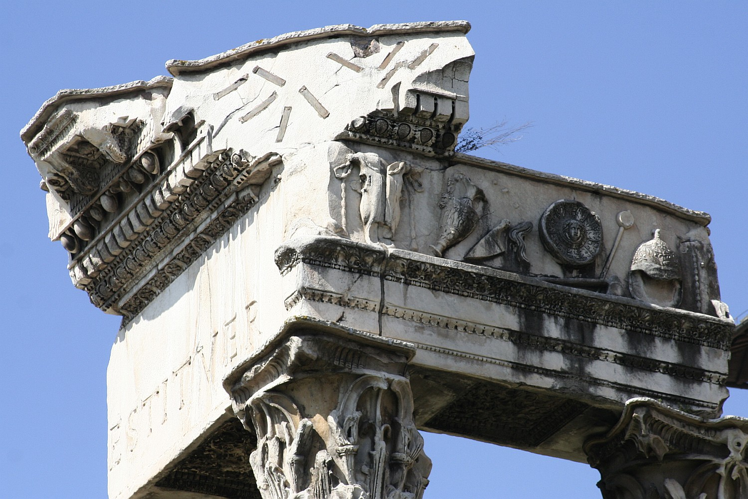 Détail de l'entablement du temple de Vespasien.